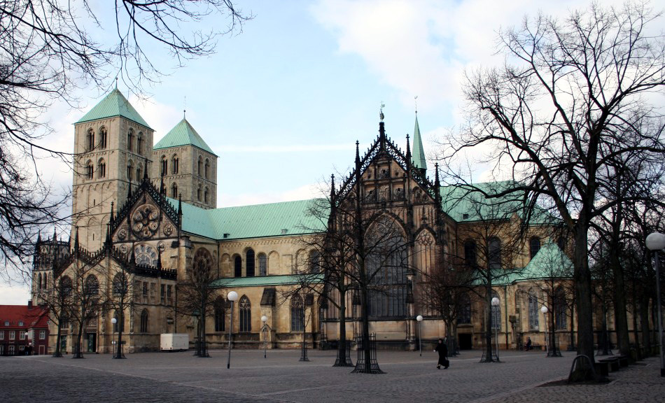 Beschreibung: Der St-Paulus-Dom in Münster (Westfalen) Quelle: erstellt am 07.03.2006 Fotograf oder Zeichner(in): Marie-Luise Carl